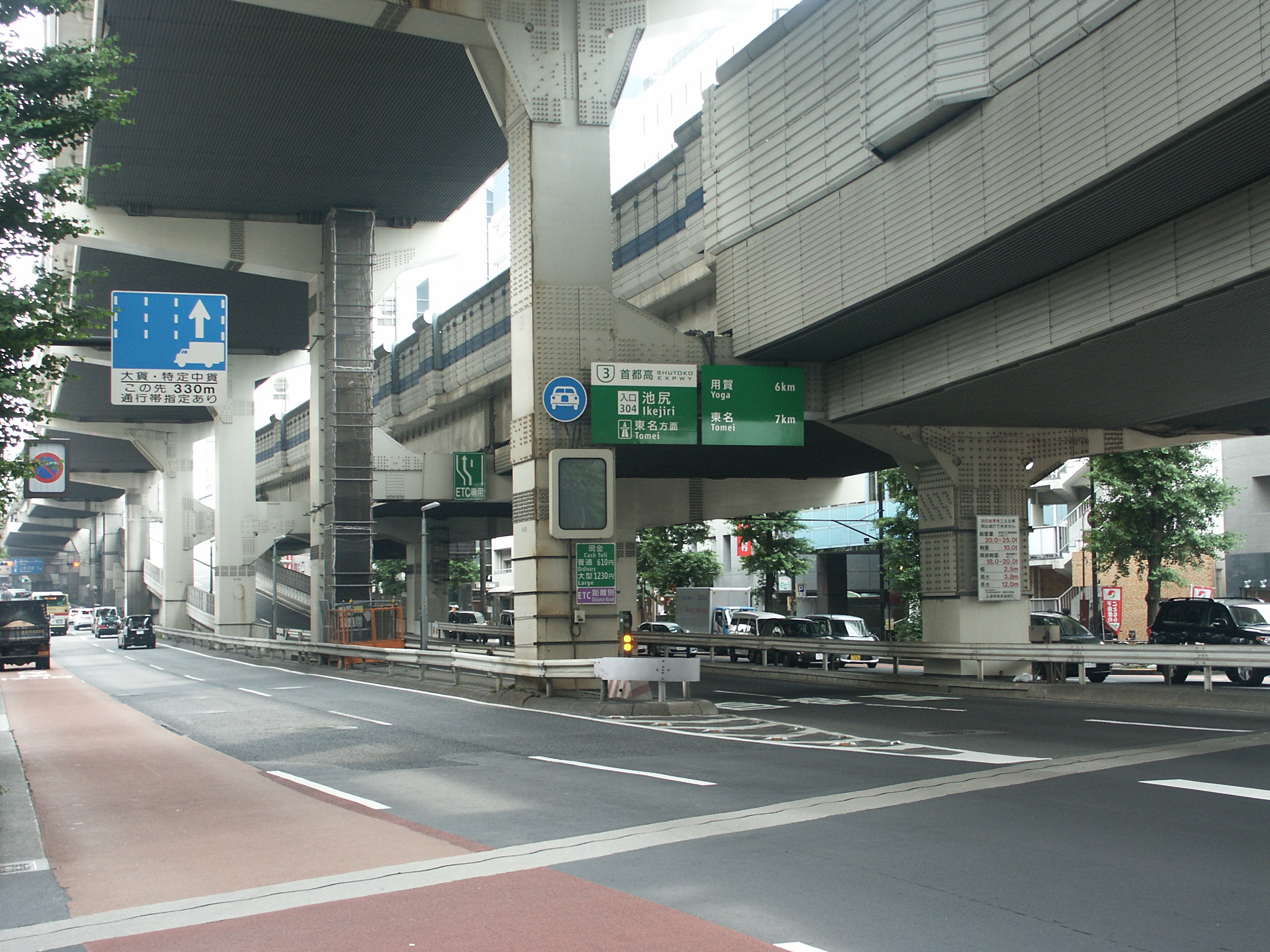 首都高速道路3号渋谷線池尻入口付近